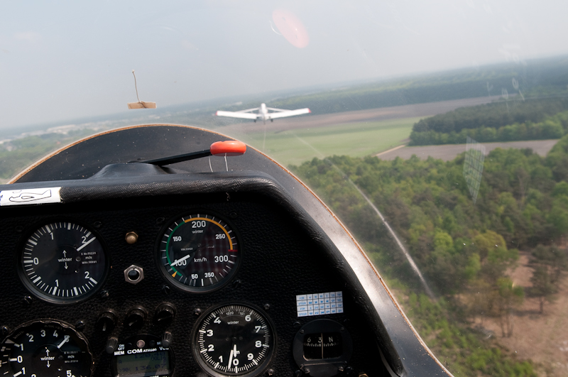 Sleepstart boven Zwartberg - Genk